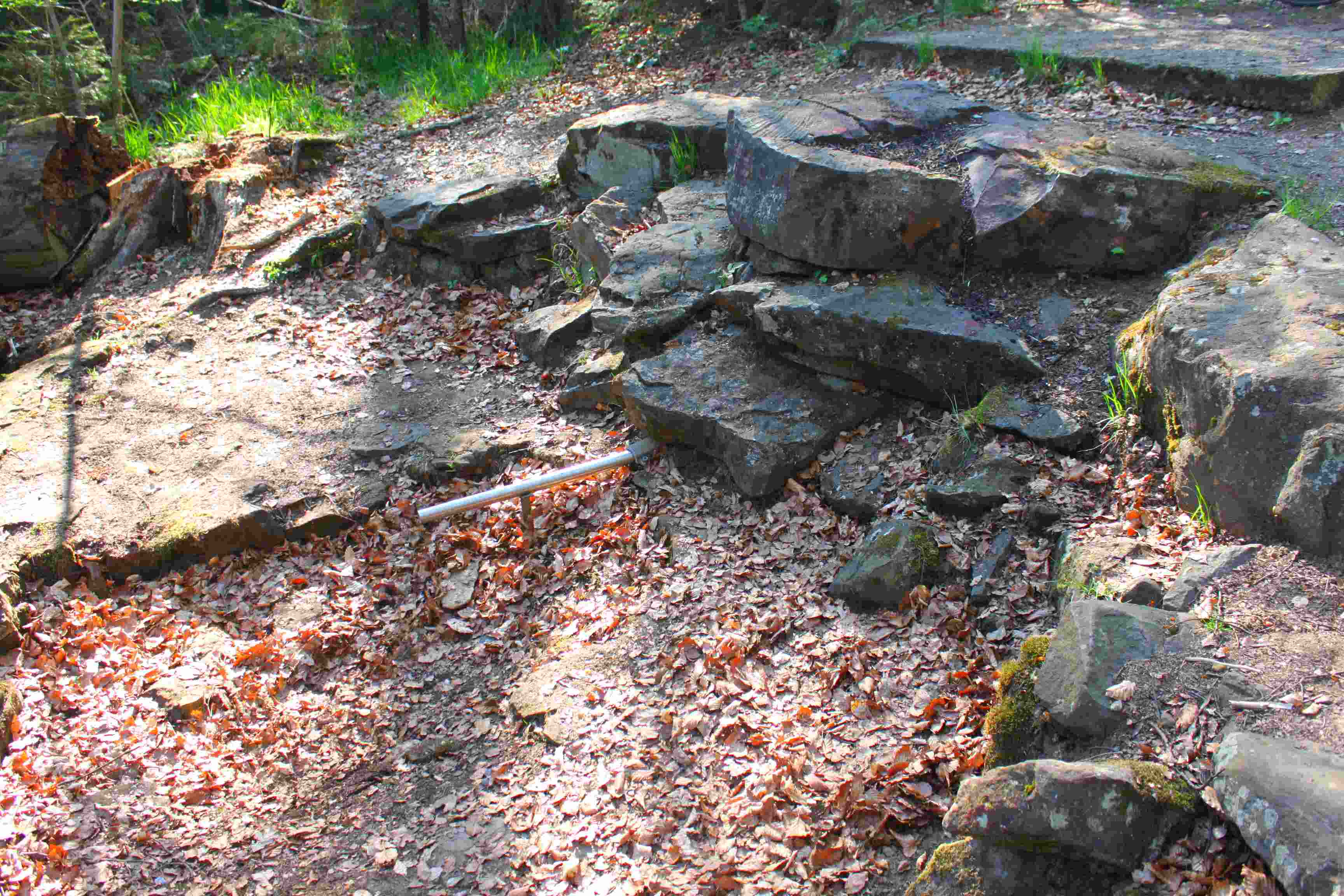 Die Rotmainquelle bei Lindenhard